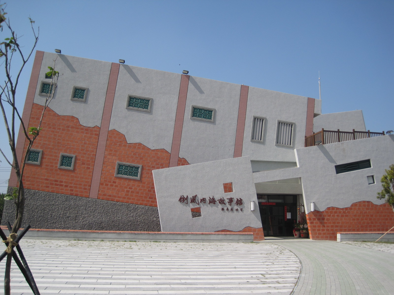 臺南麻豆的倒風內海故事館